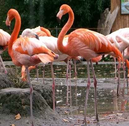 Kubaflamingos im Zoo Dresden, 31.10.2004